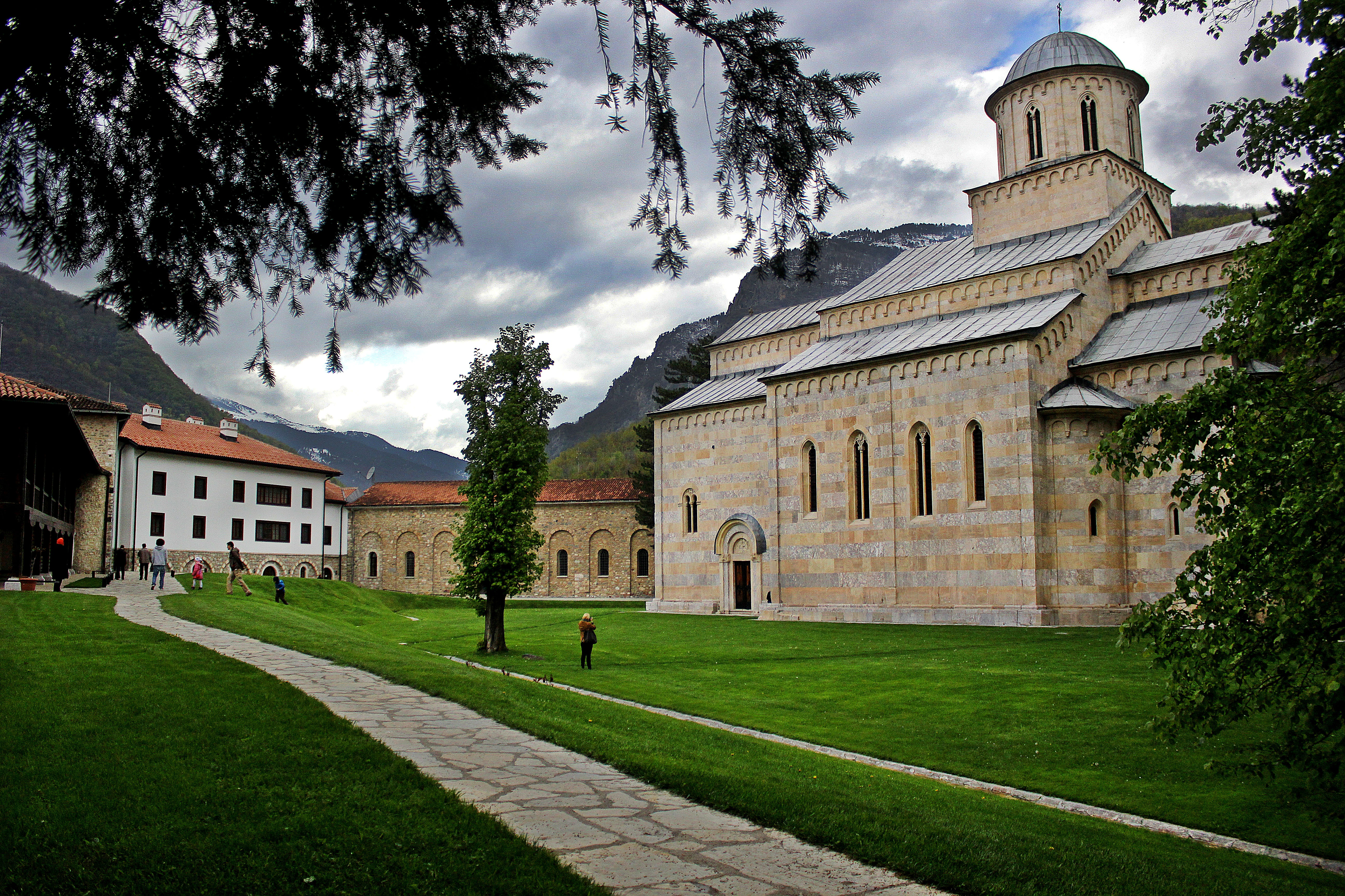 Manastiri i Deçanit